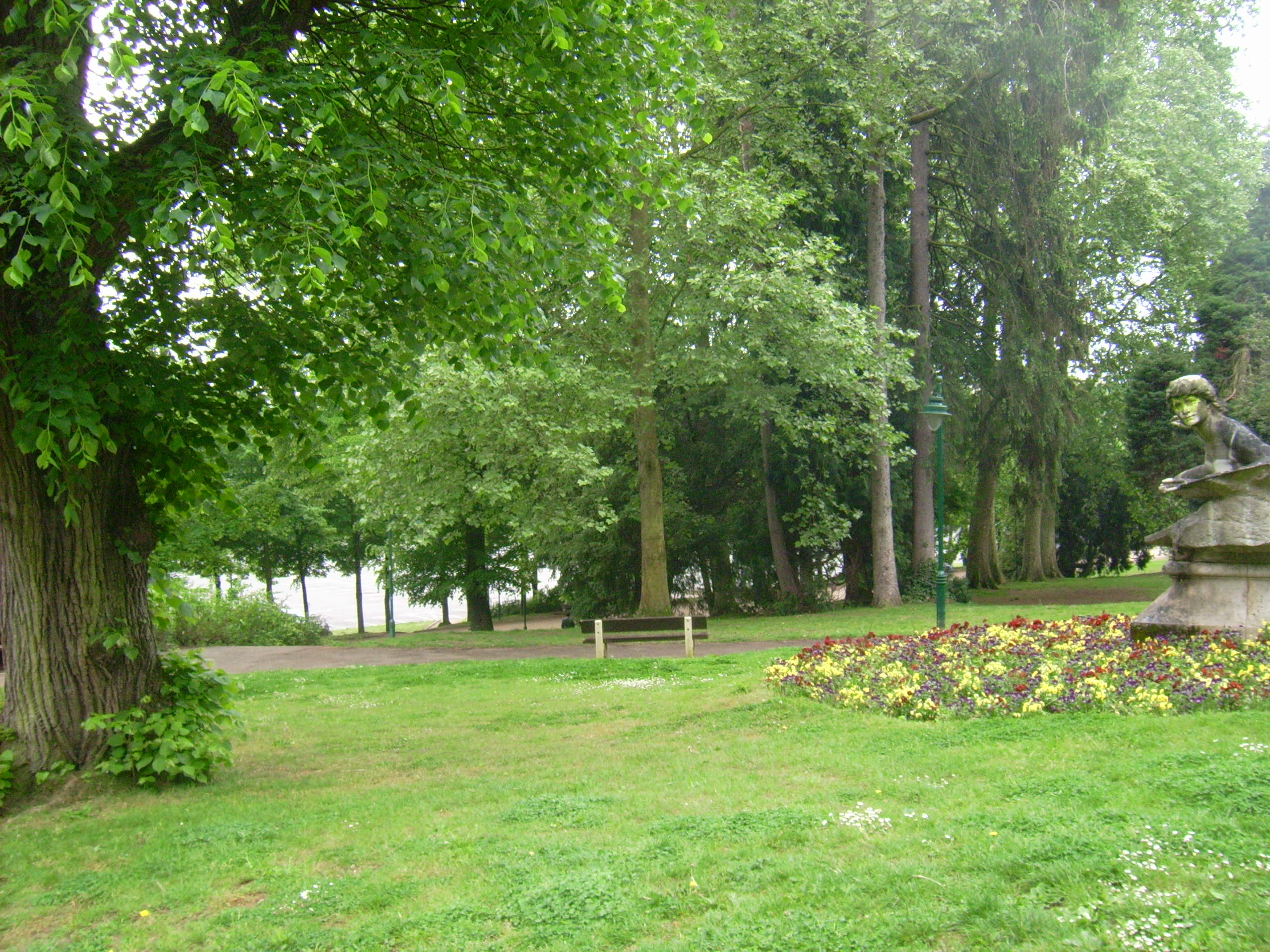 Les jardins des Quinconces des Jacobins Le Mans